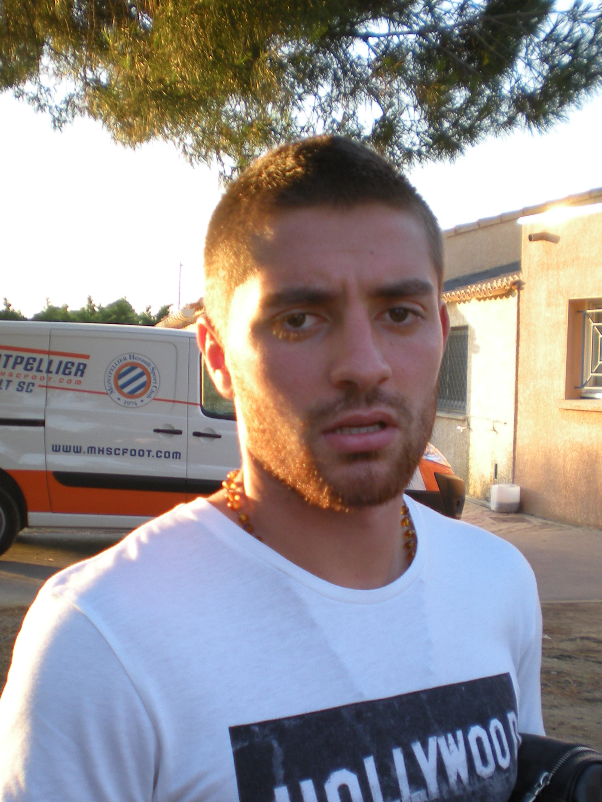 31 Juillet 2012.